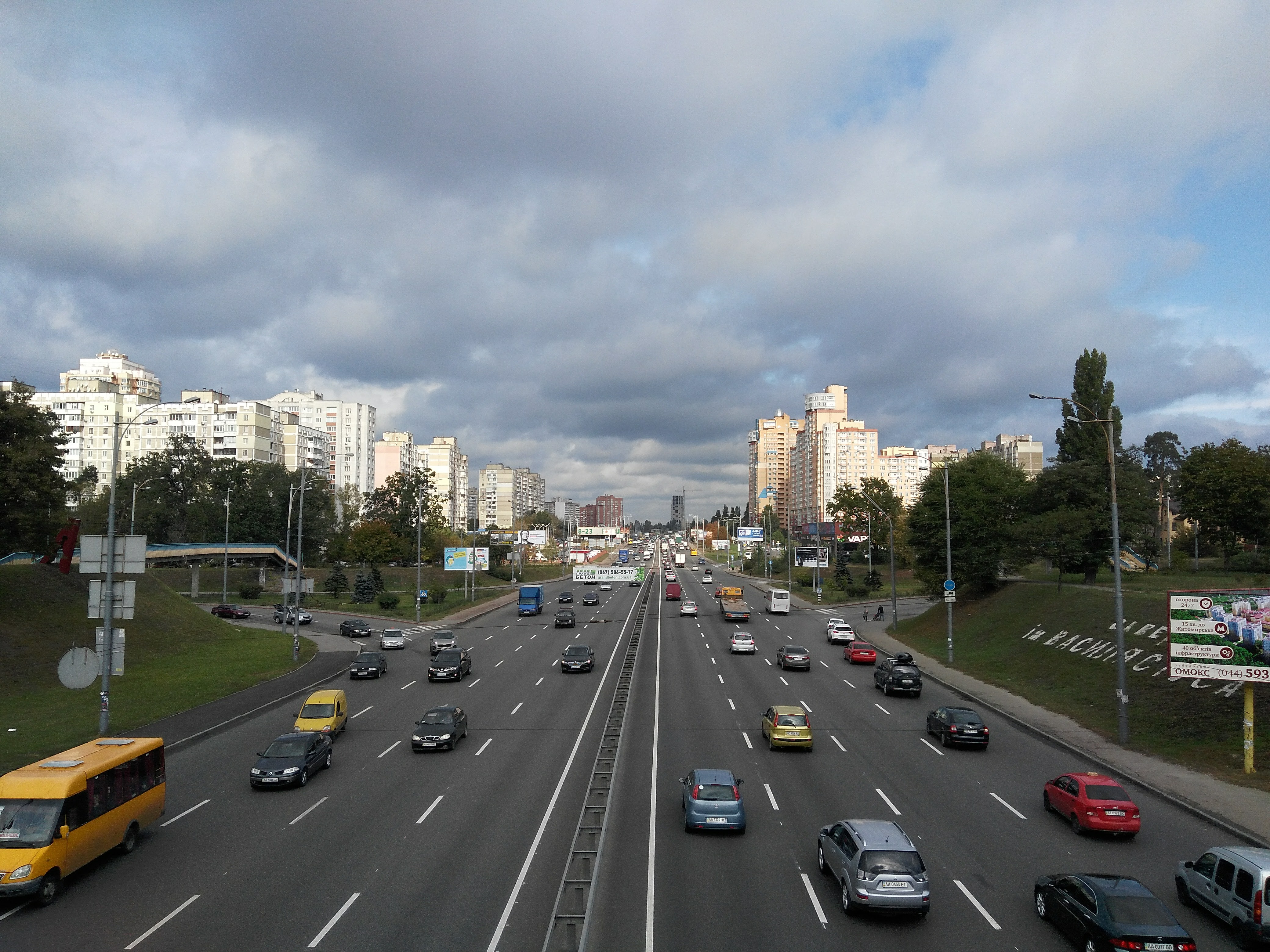 Проспект Академіка Палладіна, м. Київ, вид з проспекту Перемоги, 10 жовтня 2017 року